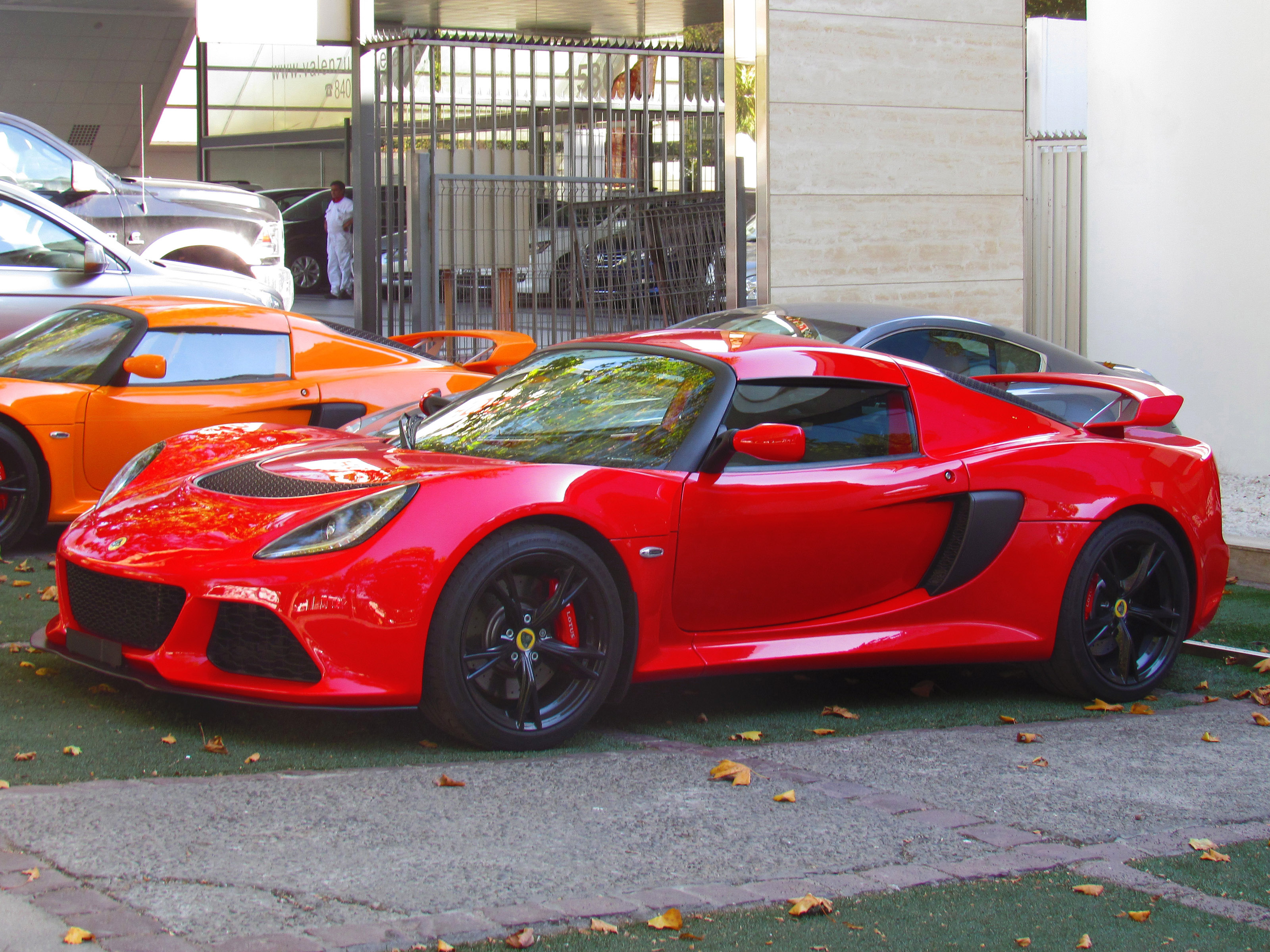 Lotus Exige S 2014